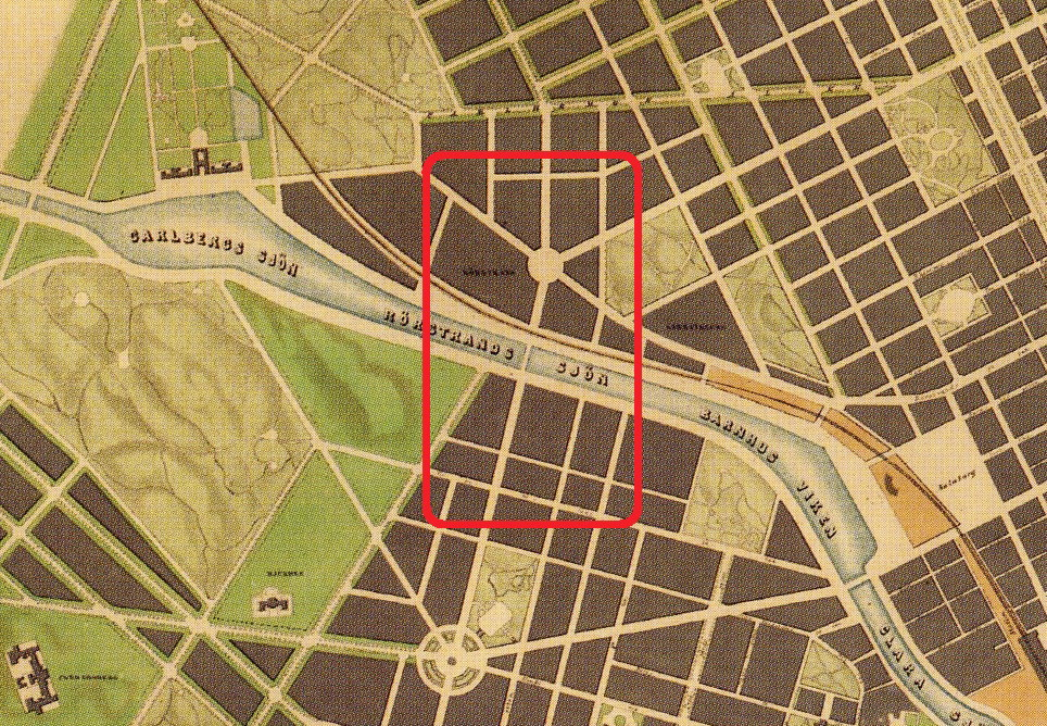 Del av Albert Lindhagens plan för Norrmalm och Kungsholmen i Stockholm år 1866